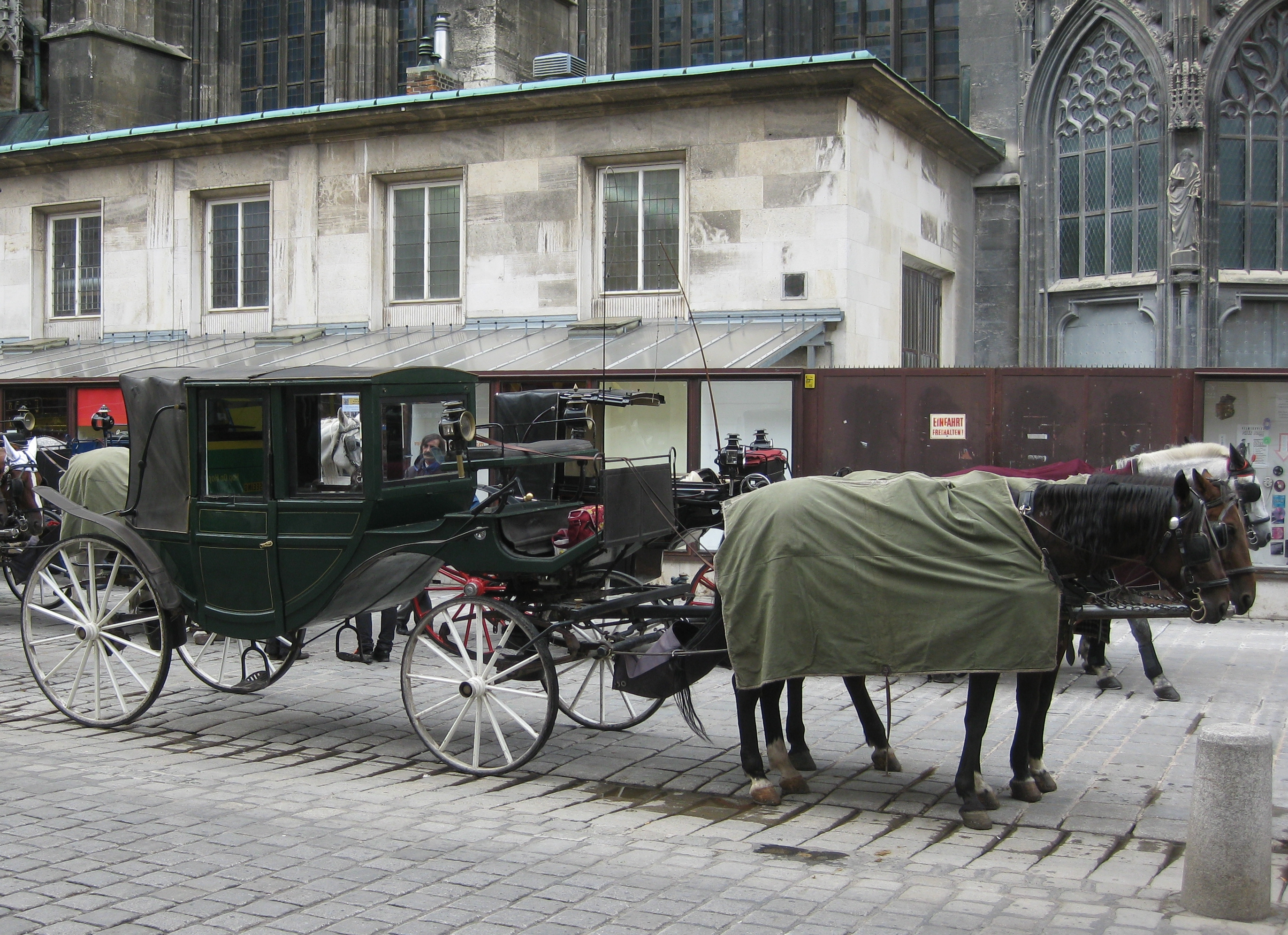 Österreich, Wien; am Stephansdom: Fiaker, geschlossen.